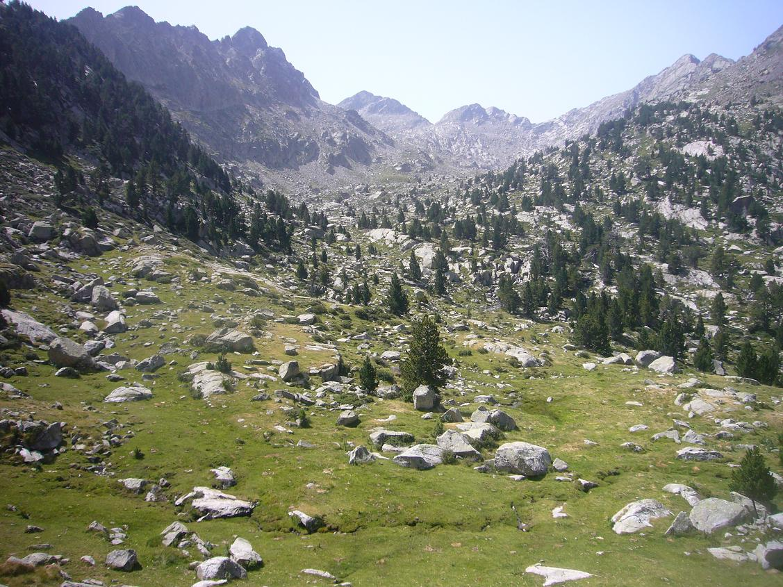 Cometa de les Mussoles, la Vall de Boí, Alta Ribagorça, Catalunya.